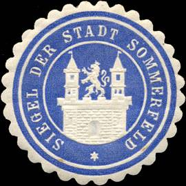 Sealing stamp Title: Siegel der Stadt Sommerfeld Description: blau, weiß, geprägt Place: Sommerfeld size: 4 cm